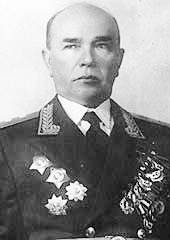 Иван Тимофеевич Шлёмин (1898 — 1969) — советский военачальник